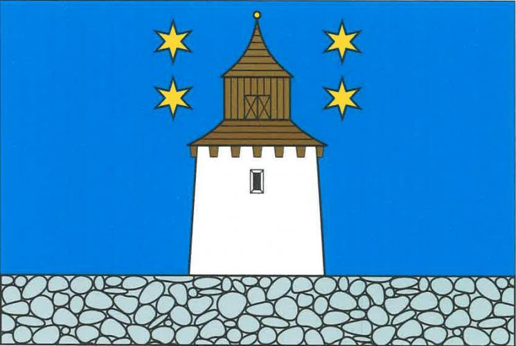 Vlajka, Korouhev, okres Svitavy